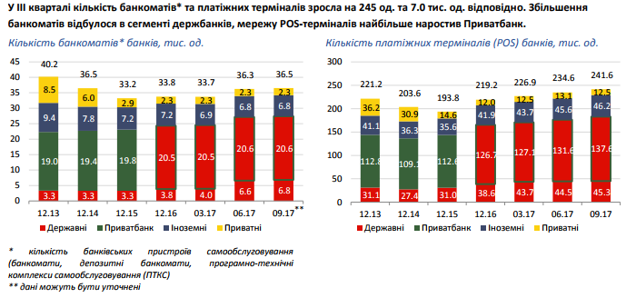 Кількість банкоматів та платіжних терміналів у динаміці протягом 2013-2017 рр.